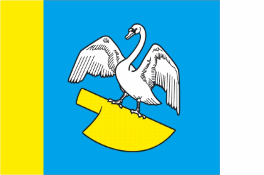 Vlajka obce Staré Heřminovy